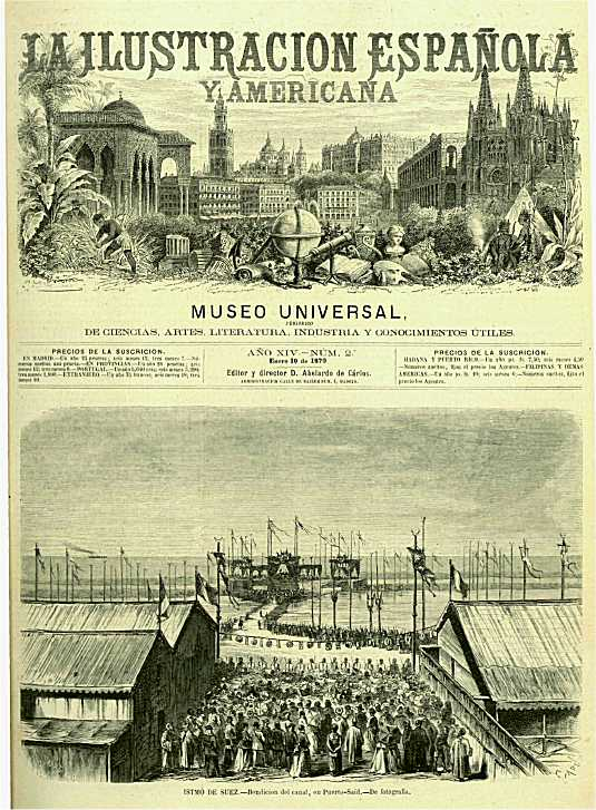 Copertina del 2° numero di "La Ilustración Española y Americana" fondata da Abelardo de Carlos che ne era anche il proprietario oltre che direttore fino al 1881. La pubblicazione cessò nel 1921